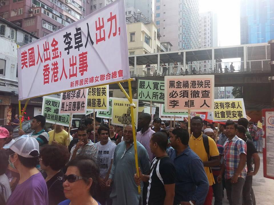 遊行中代表新界居民婦女聯合總會的南亞漢